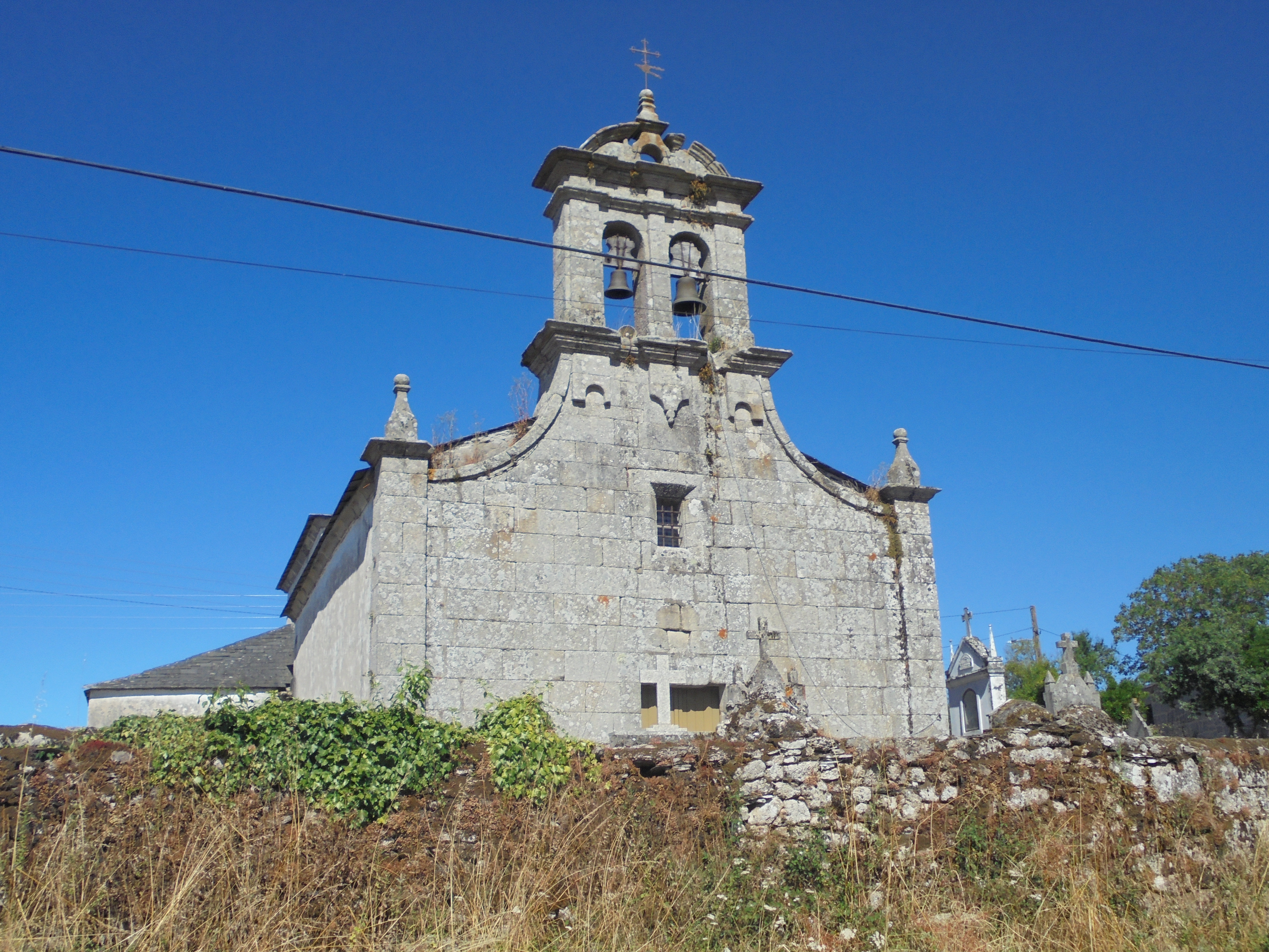 Igrexa parroquial de Pedreda ( Lugo)